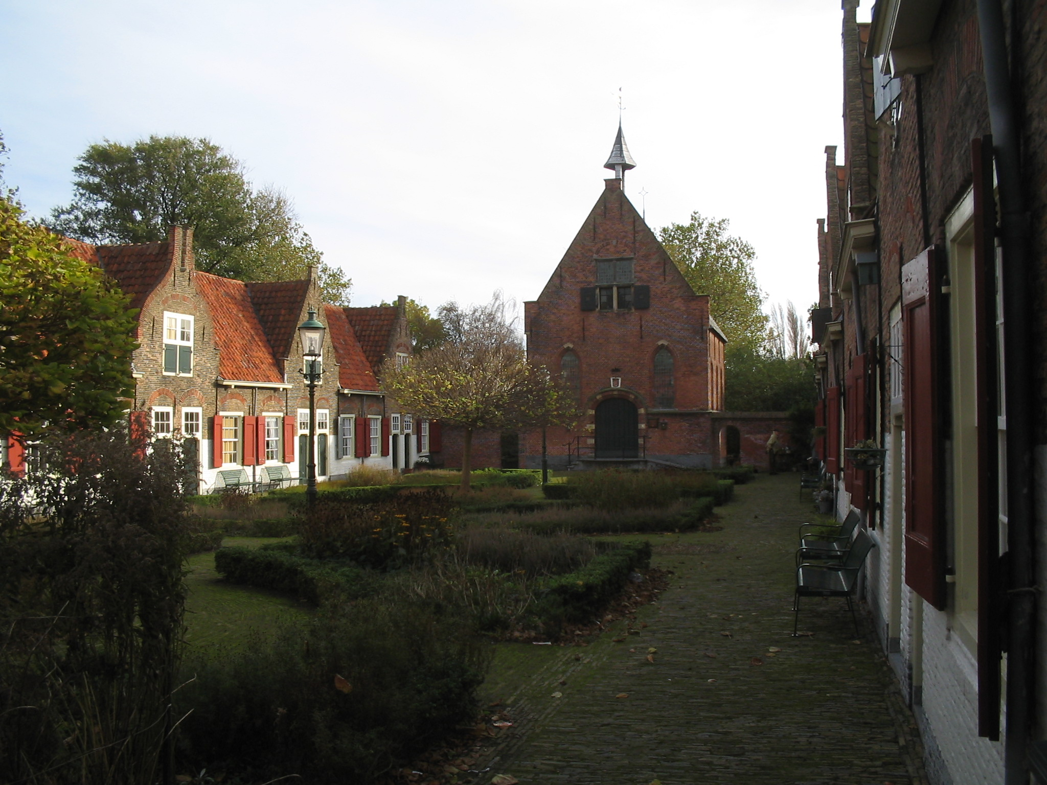 Naaldwijk, Heilige Geesthof, 6 november 2005